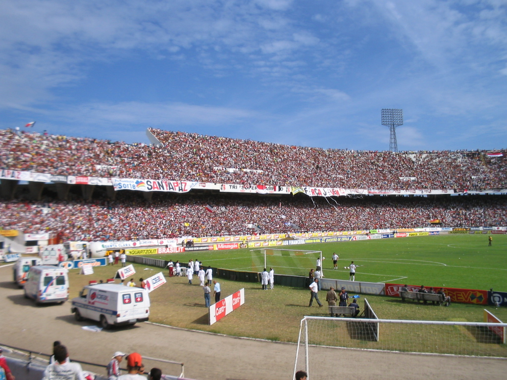 Estádio Arruda, em Recife, Pernambuco, Brasil